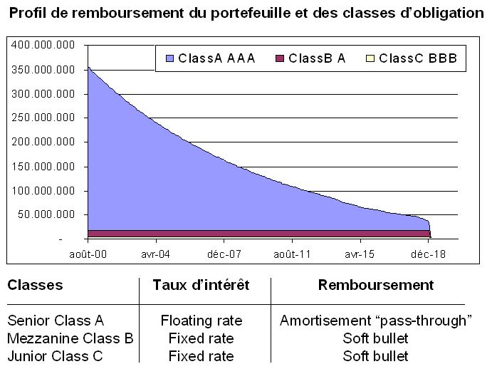 Description: Amortissement d'une opération de titrisation Source: Bradypus Licence: Bradypus